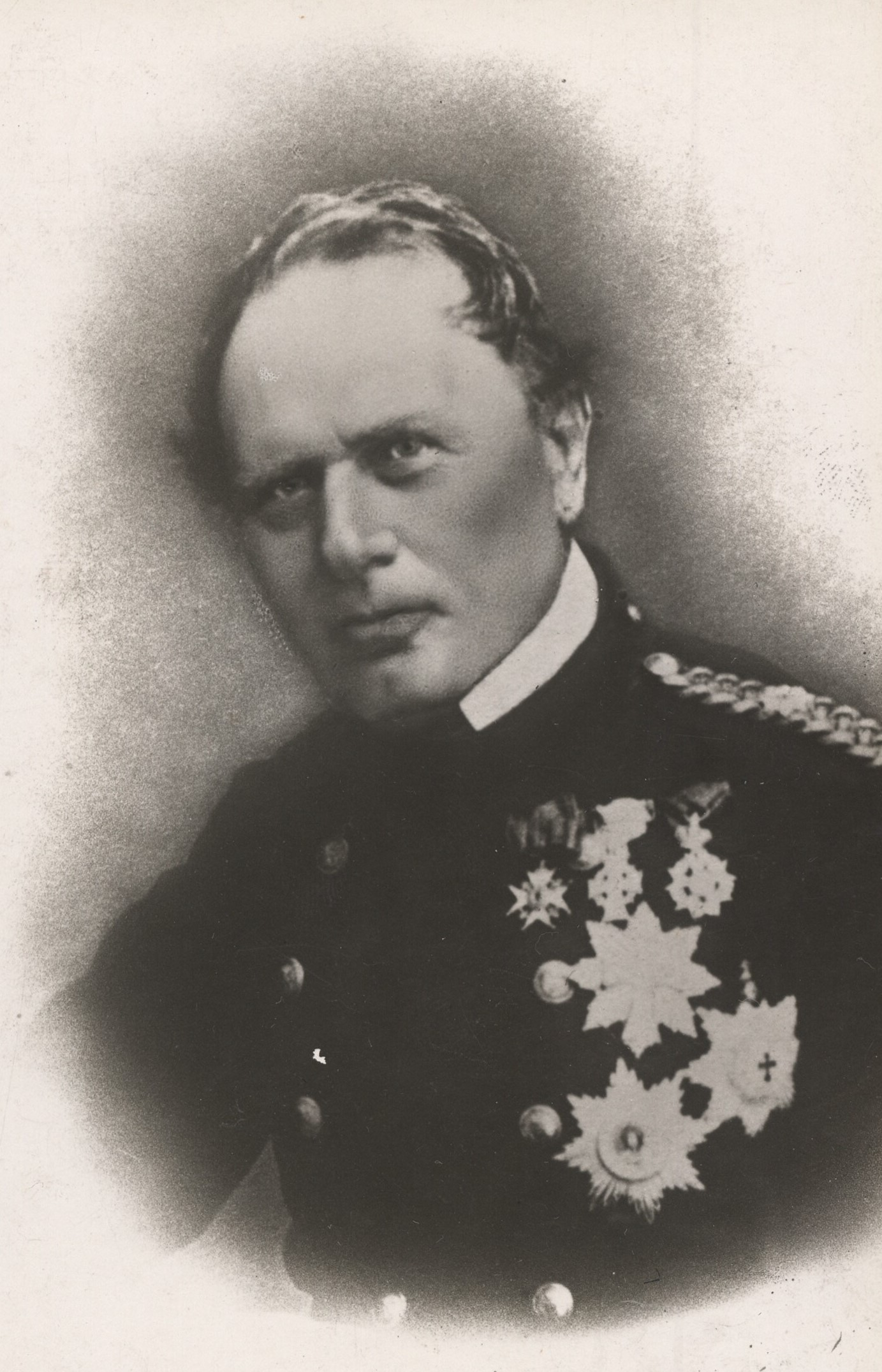 Carl Edvard van Dockum (29. februar 1804- 29. januar 1893) var en dansk søofficer, admiral og marineminister.